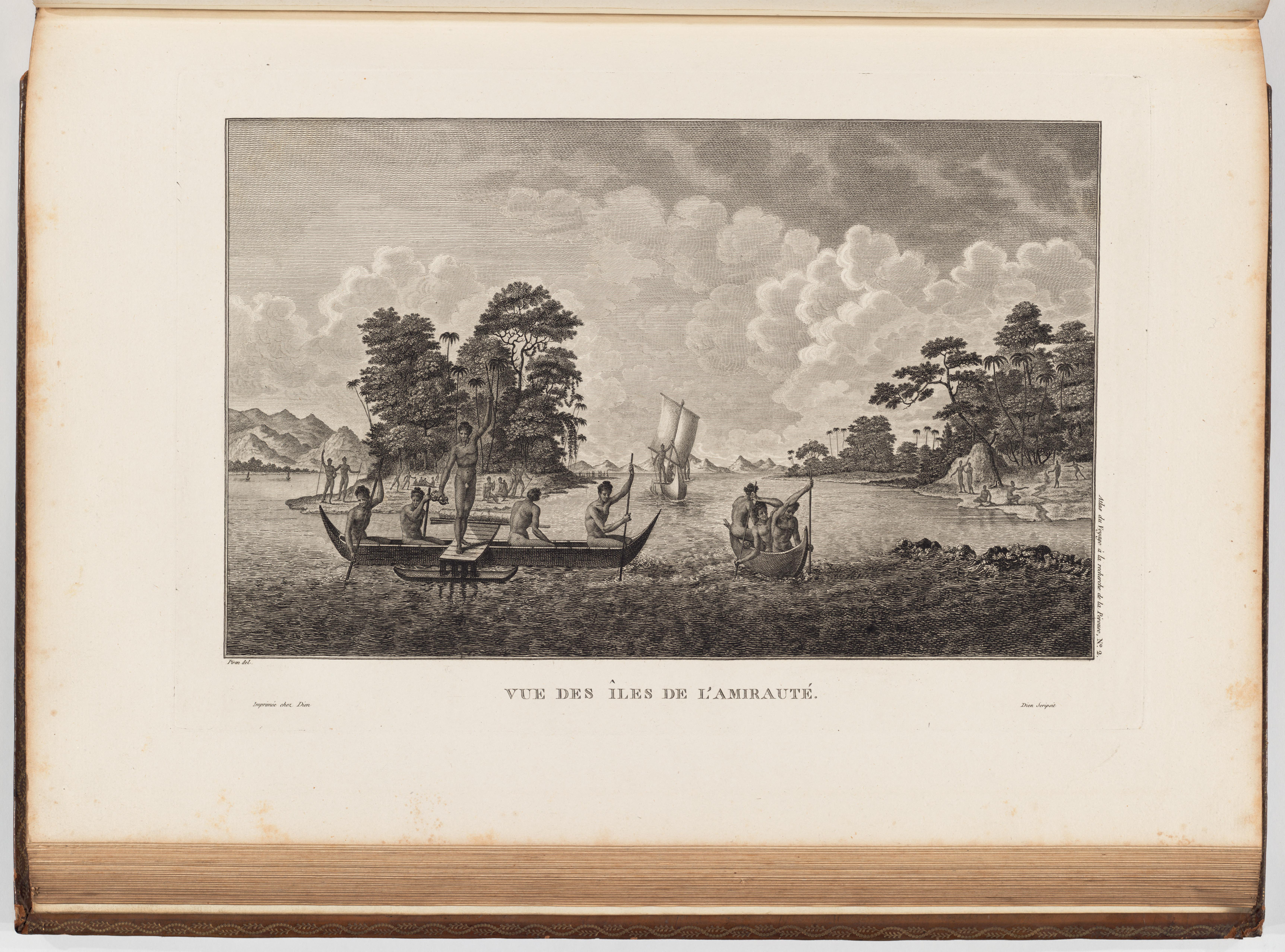 Voyage de La Pérouse autour du monde /publié conformément au décret du 22 avril 1791, et rédigé par L.A. Milet-Mureau.